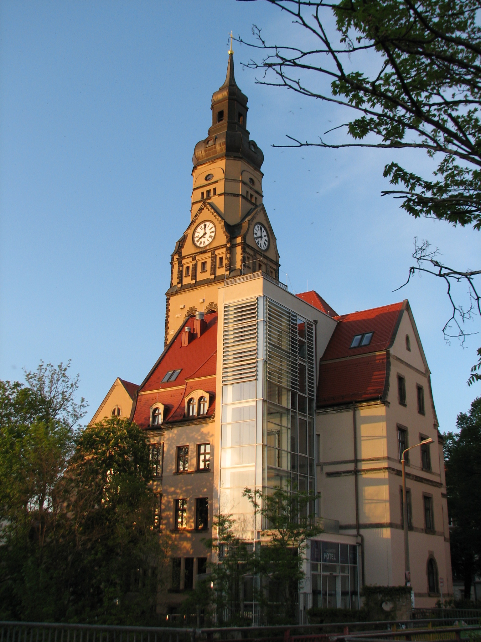 Philippuskirche und das Integrationshotel mit Fahrstuhlanbau im einstigen Pfarrhaus, Foto vom April 2019